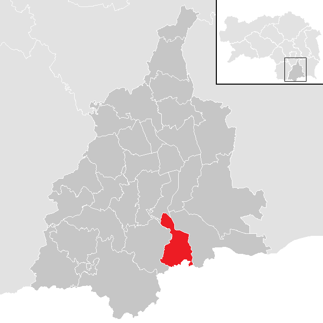 Lage von Ehrenhausen an der Weinstraße im Bezirk Leibnitz